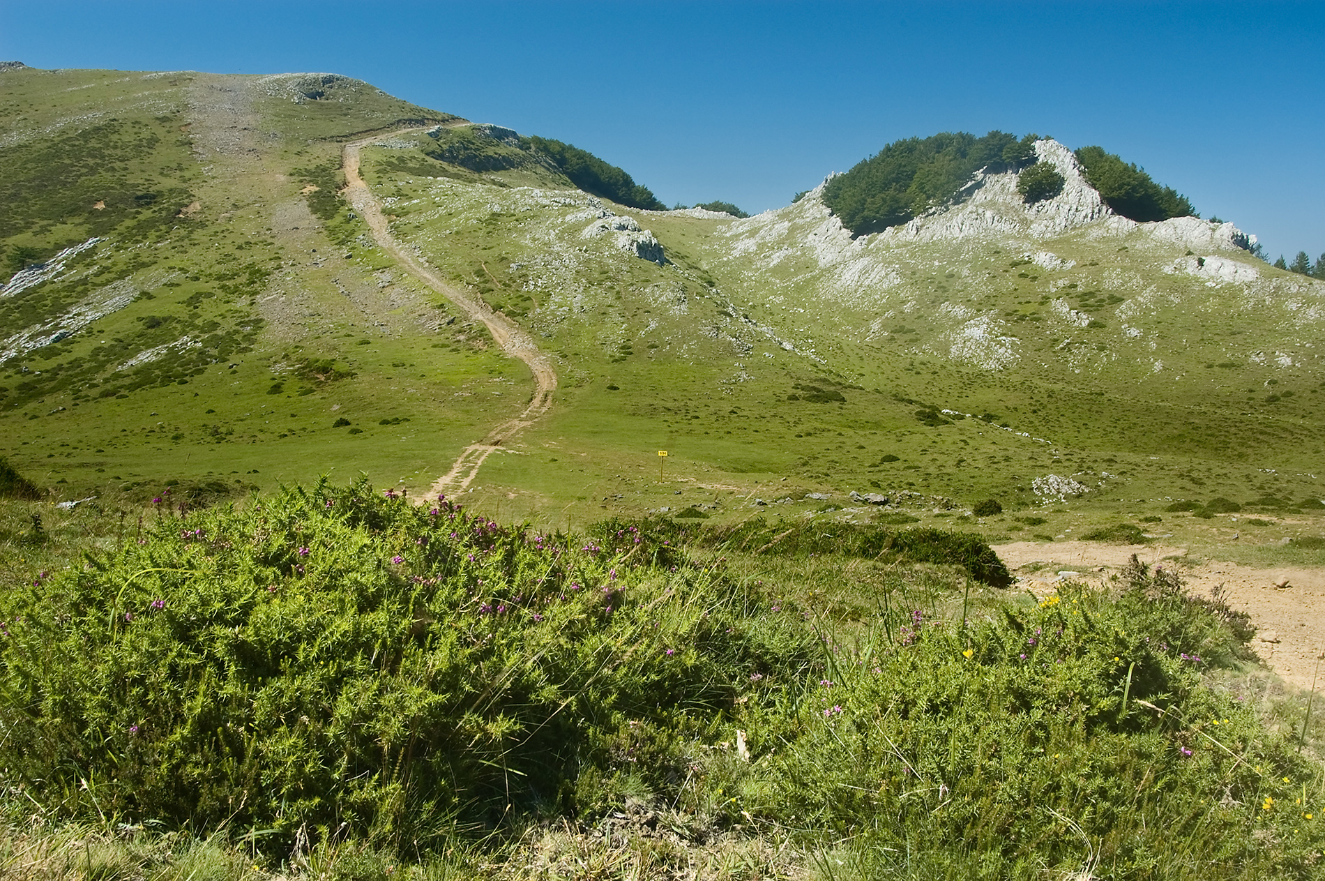 Ezkerrean Arlutz, eskuinean Erlaitz. You can contribute by translating this description into more languages.